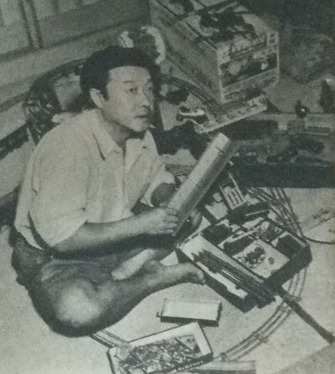 横山隆一